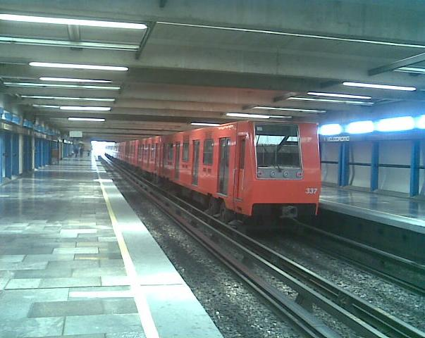 NC-82 en la estación Velodromo de la Linea 9.